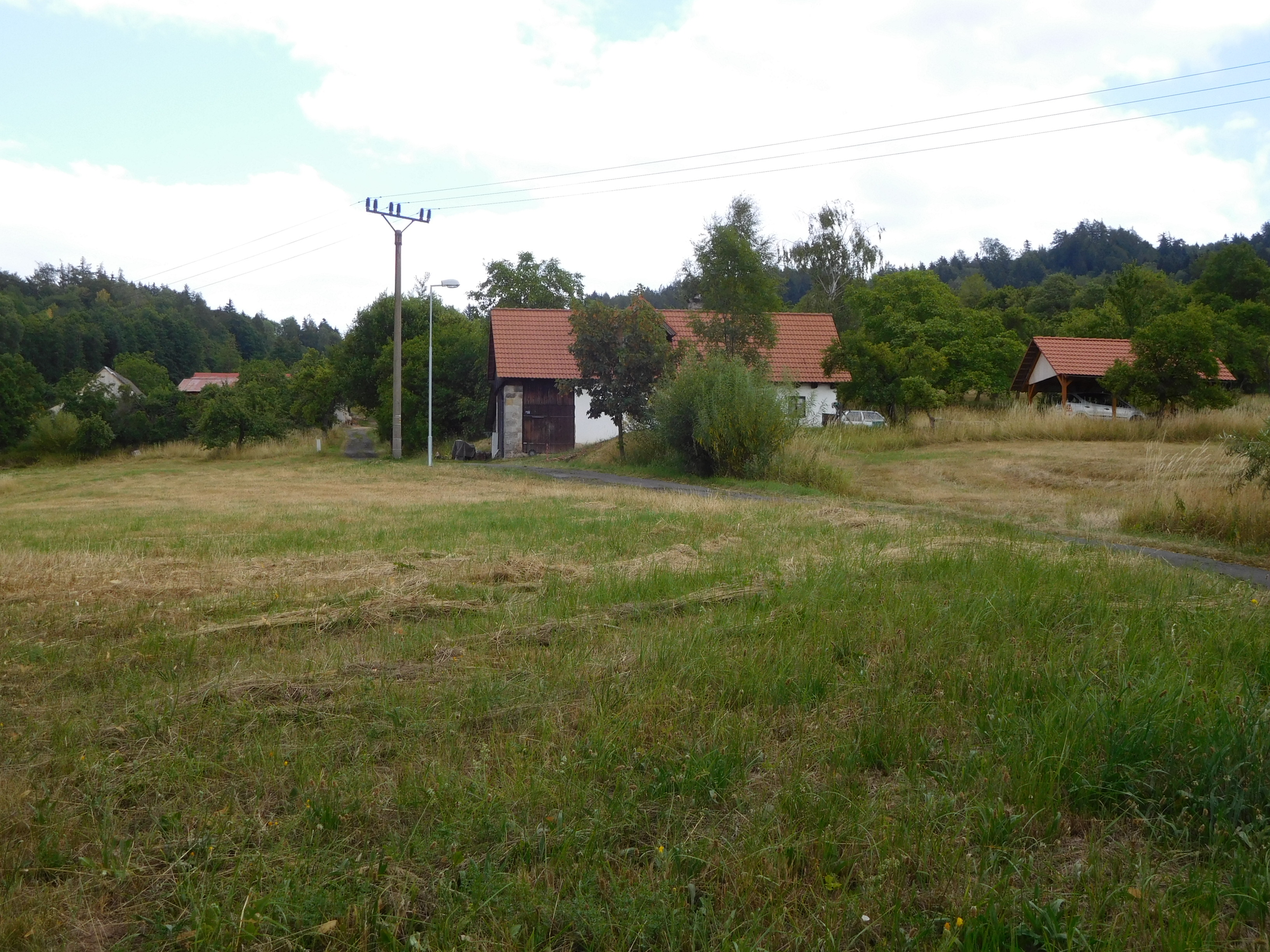 Prackov - východní část